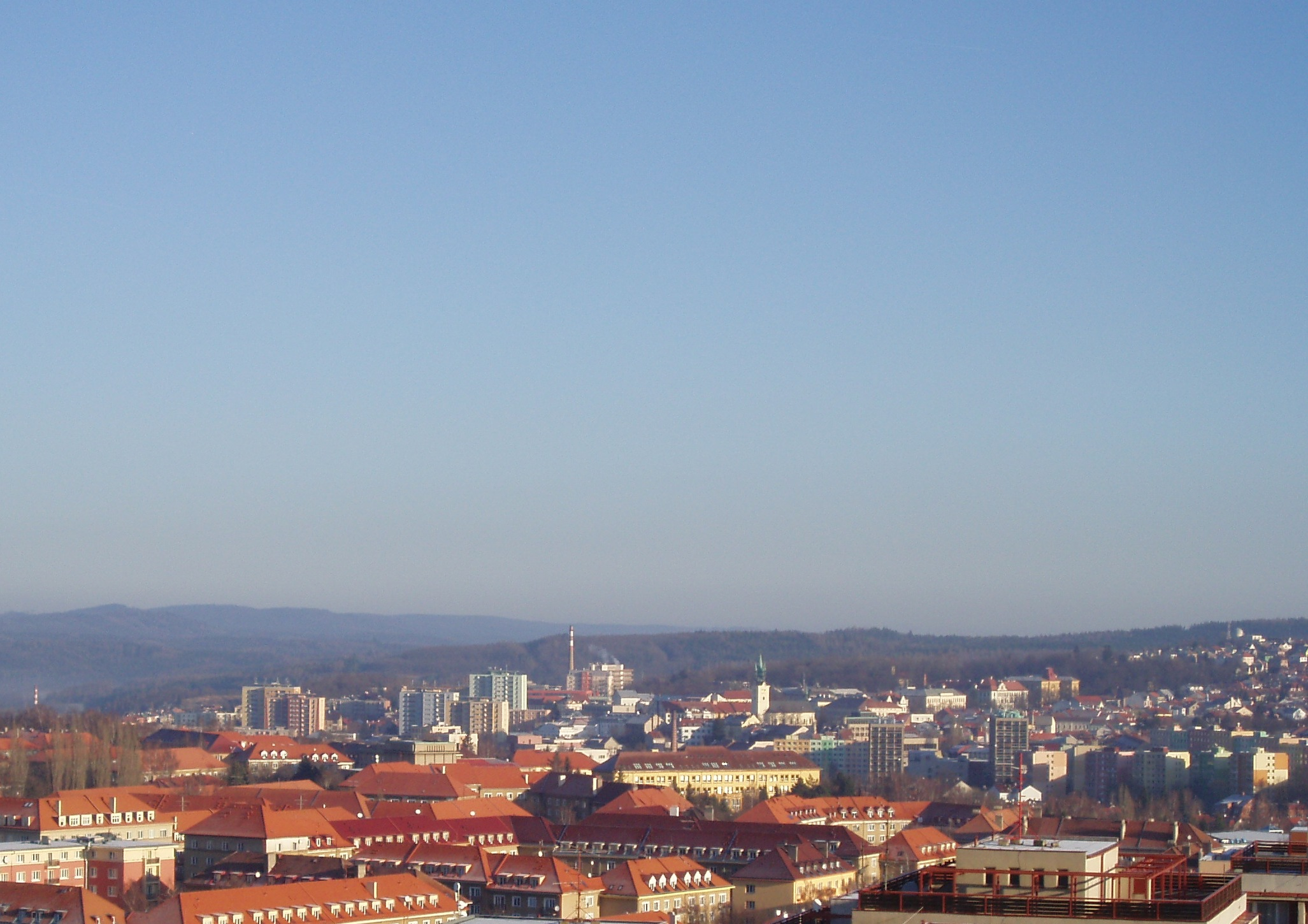 POhled na městskou část Příbram I z Čertova vrchu